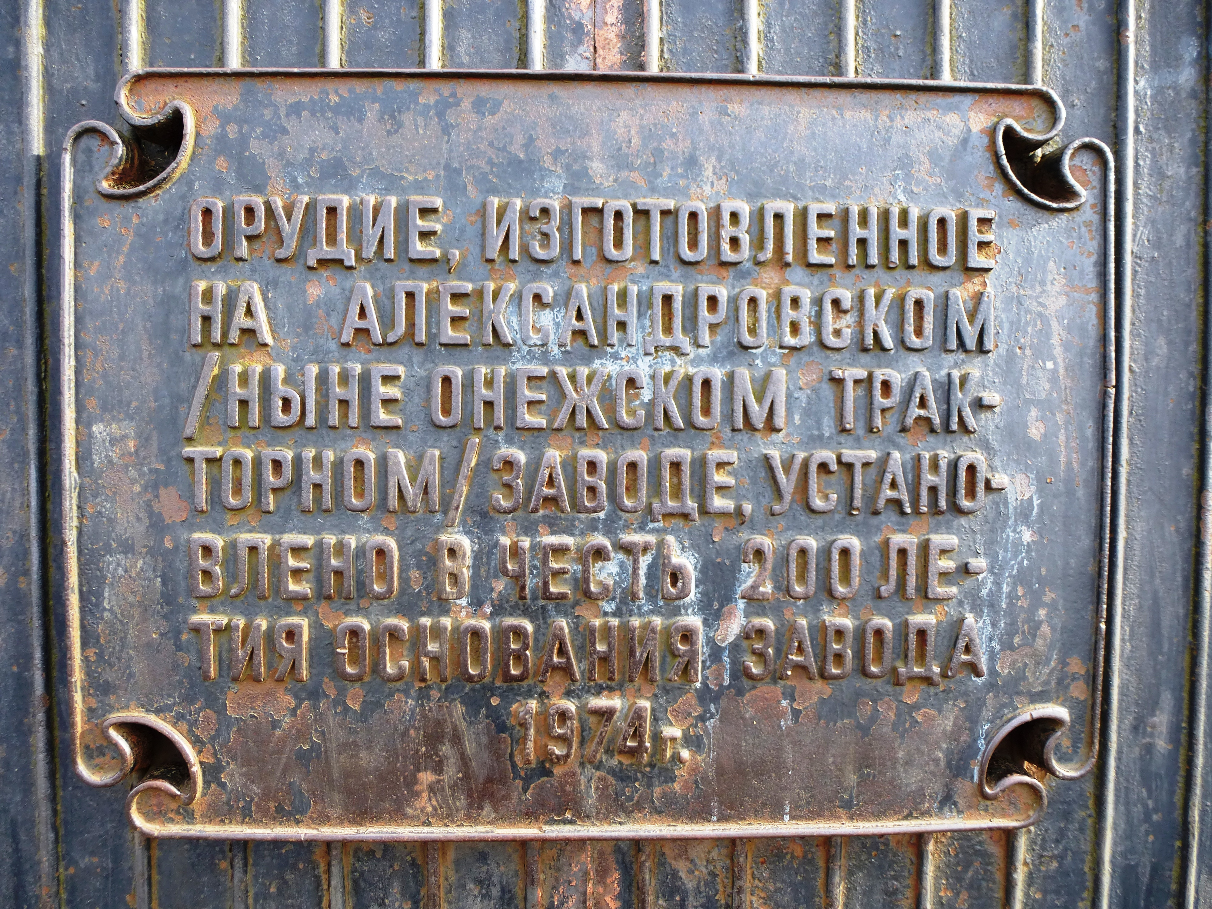 Памятная доска на памятнике "Пушка Александровского завода" в Петрозаводске